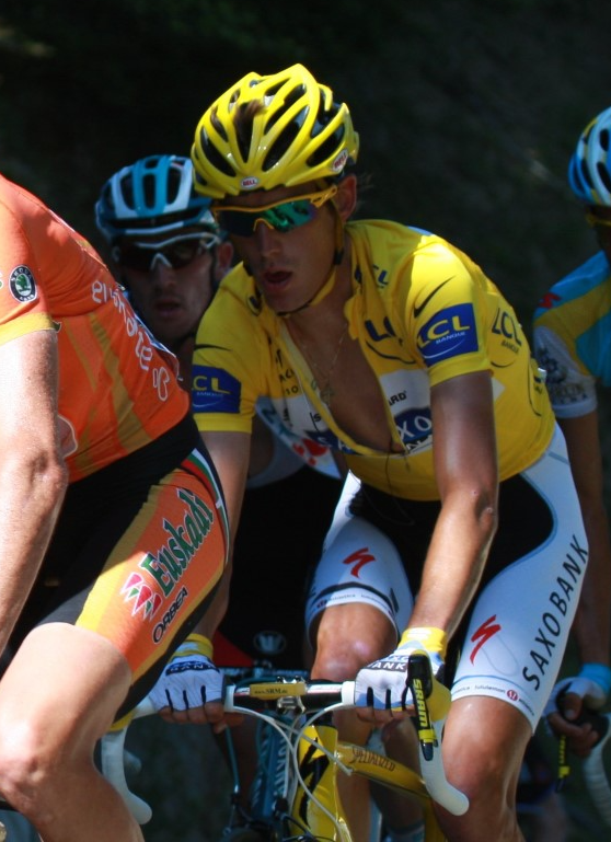 Foto de Andy Schleck vistiendo el maillot jaune en el Tour 2010